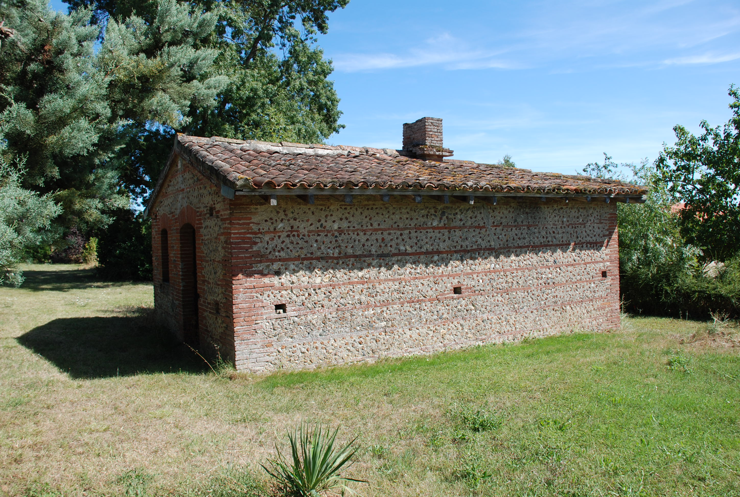 Bâtiment abritant l'ancien four à pain de Vigoulet-Auzil, situé dans le quartier de La Ponte (La Pounte, en occitan, qui signifie la pointe), aujourd'hui La Guérinière. Ce beau bâtiment rural qui jadis faisait partie de la propriété Billot, aujourd'hui Bystricky, est visible en bordure de la route départementale, à la hauteur des feux du carrefour. Il ne figure pas sur le plan cadastral de 1808, sa construction est donc postérieure à cette date. Ce lieu-dit est connu pour avoir été celui de la forge, tenue par des générations de la même famille, les Villot, au 18ème siècle, appelée ensuite Billot, jusqu'à une époque récente. La forge initiale devait se situer intialement dans un bâtiment attenant à la maison d'habitation. Elle a ensuite été installée dans le bâtiment photographié avant d'être remplacée par le four à pain